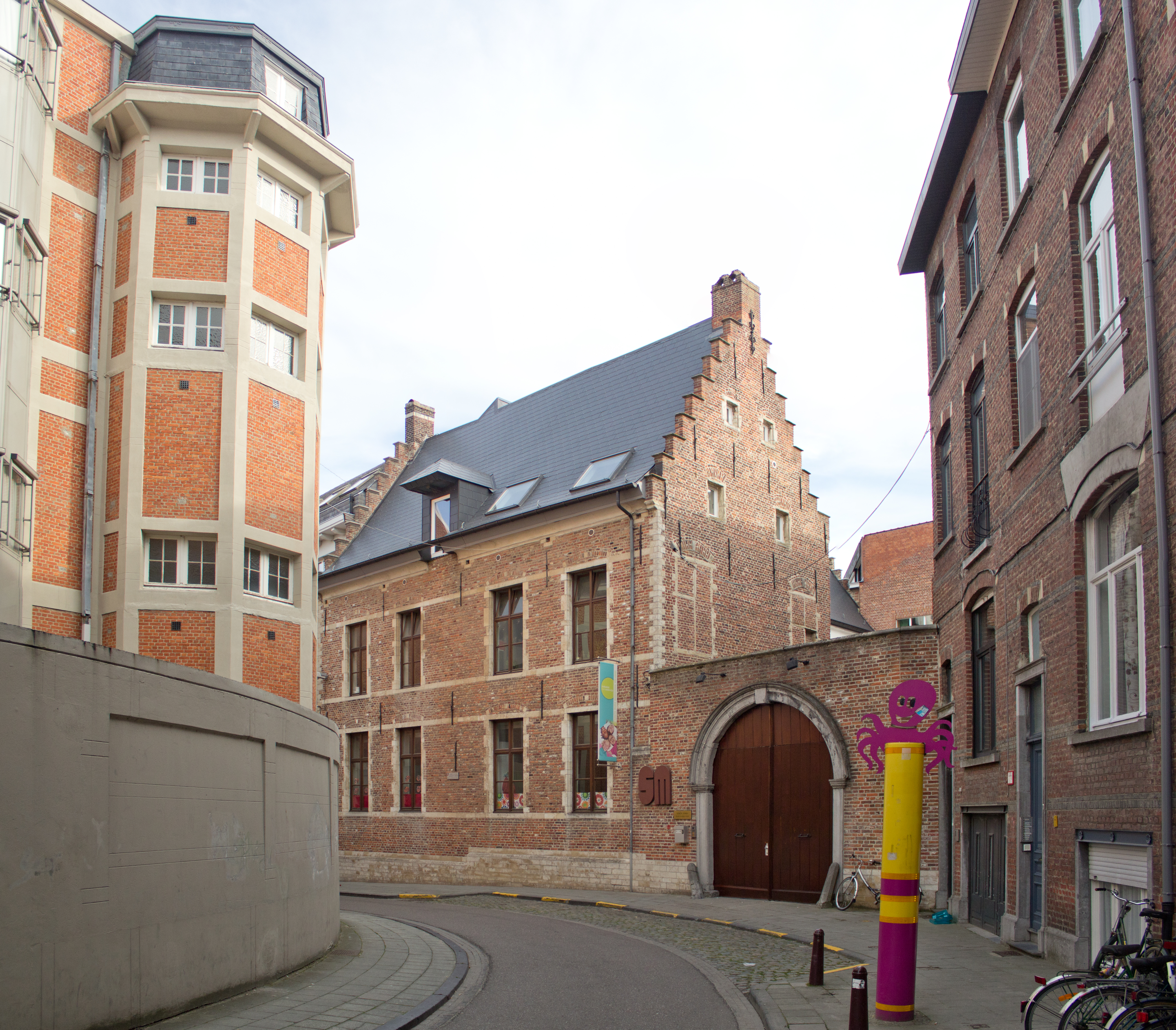 Patriciërswoning Charles Deberiotstraat 1-3, Leuven.